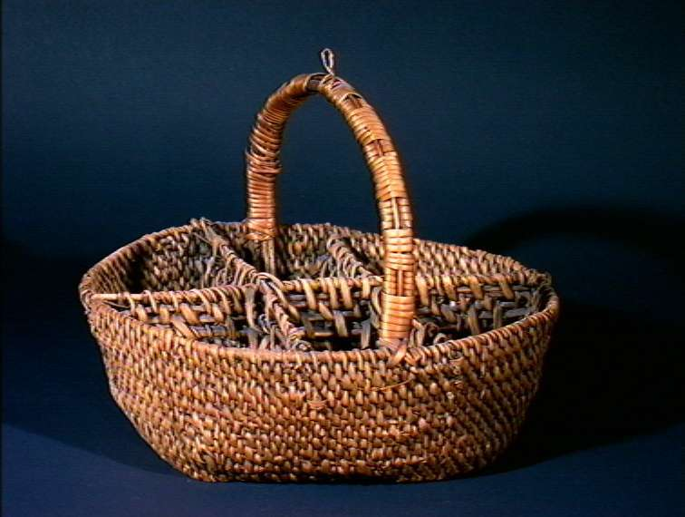 Flaskekurv fra Oslo. Lengde 40 cm. Foto Anne-Lise Reinsfelt/Norsk Folkemuseum. Flaskekurv er en kurv til å bære og til å sette fram flasker i. Betegnelsen brukes også om kurver som brukes når man skjenker av vinflasker og om eldre kasser til øl og mineralvann med tverrhank og inndelt rom for hver enkelt flske. De fleste flaskekurver er laget av tremateriale, men det finnes også flaskekurver som er laget av metalltråd.